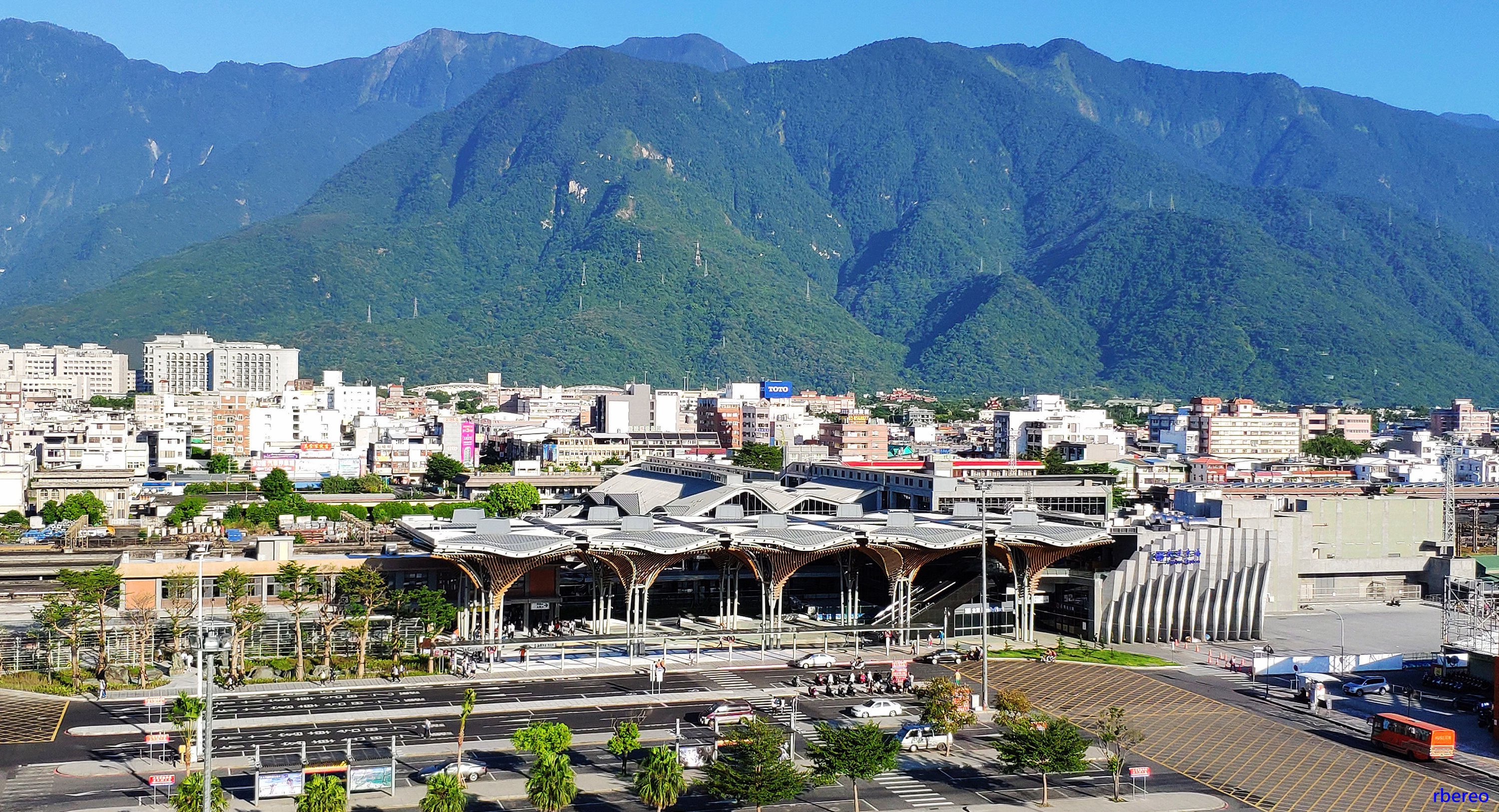 遠眺改建後花蓮車站。